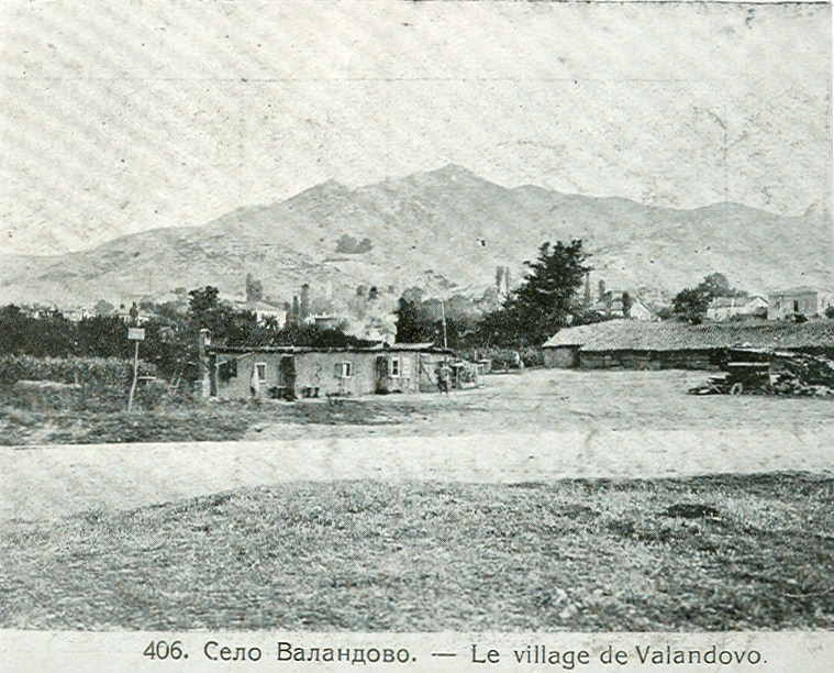 "Македония в образи", София, 1919